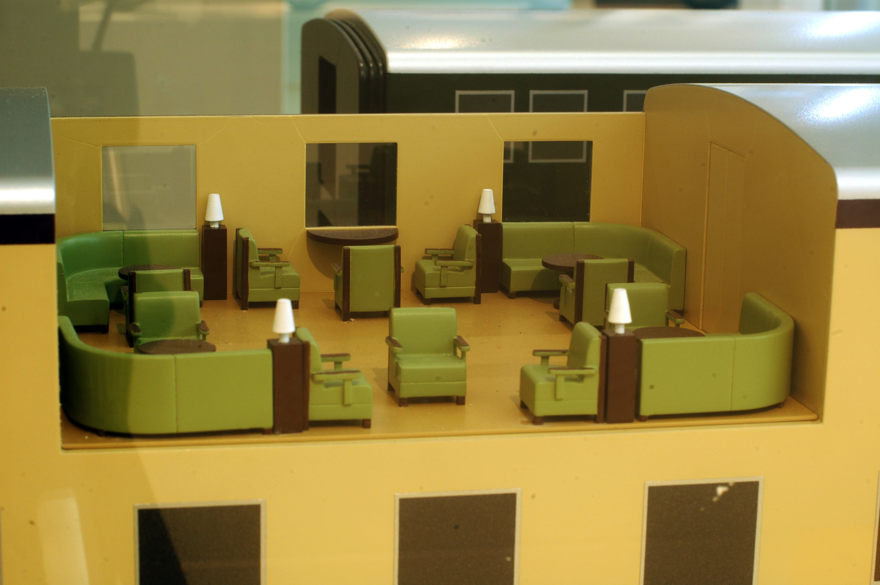 Verkehrsmuseum Nürnberg